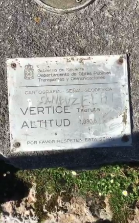 Punto geodésico situado en el alto